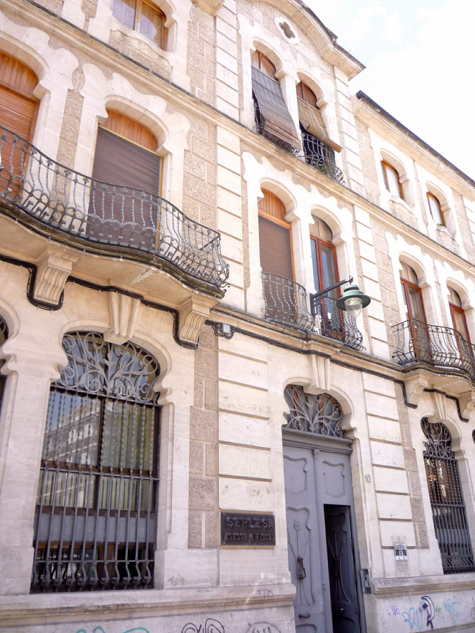 Alcoy - Vivienda modernista en la calle Joan Cantó, 10